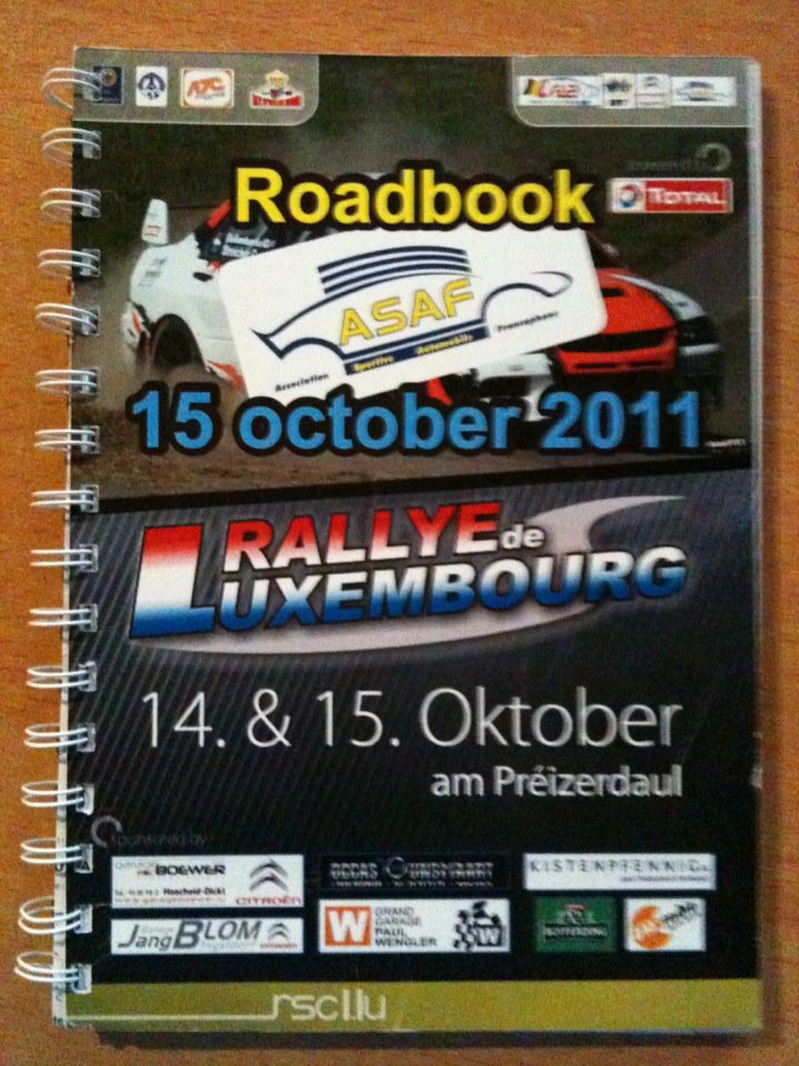 Das ist die Front eines Gebetbuches wie es ein Beifahrer in der Regel auf Rallye´s dabei hat!